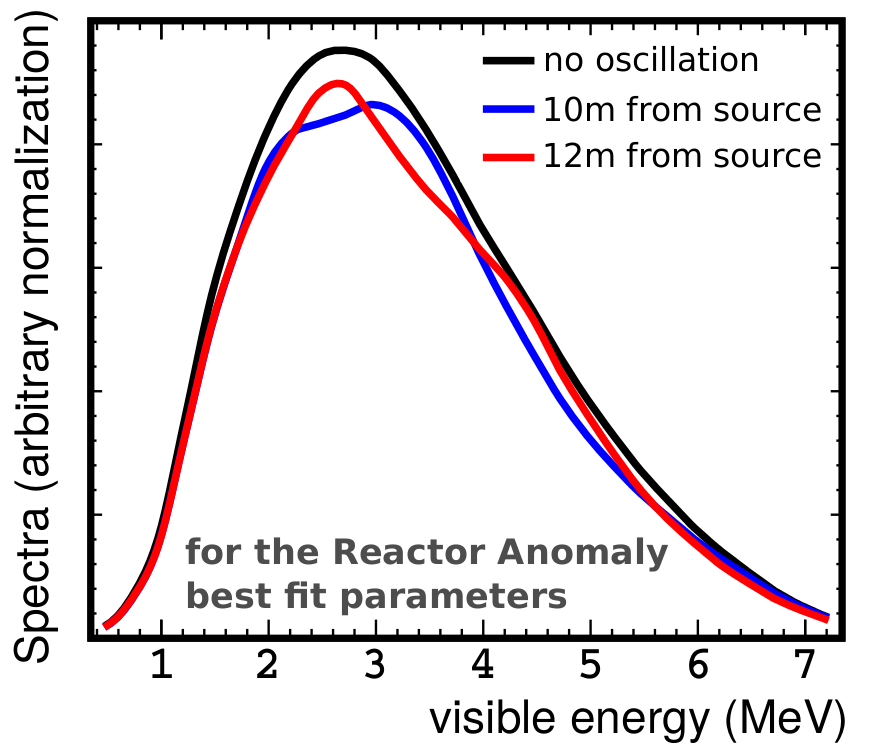 Erwartete Neutrinospektren in STEREO in der dem Reaktor am nächsten gelegenen Zelle (blau) und der am weitesten entfernten Zelle (rot) unter der Annahme von Oszillationen in sterile Neutrinos. Zusätzlich ist der Fall keiner Oszillation in schwarz gezeigt.